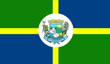 Bandeira Oficial de Santo Antonio do Leste